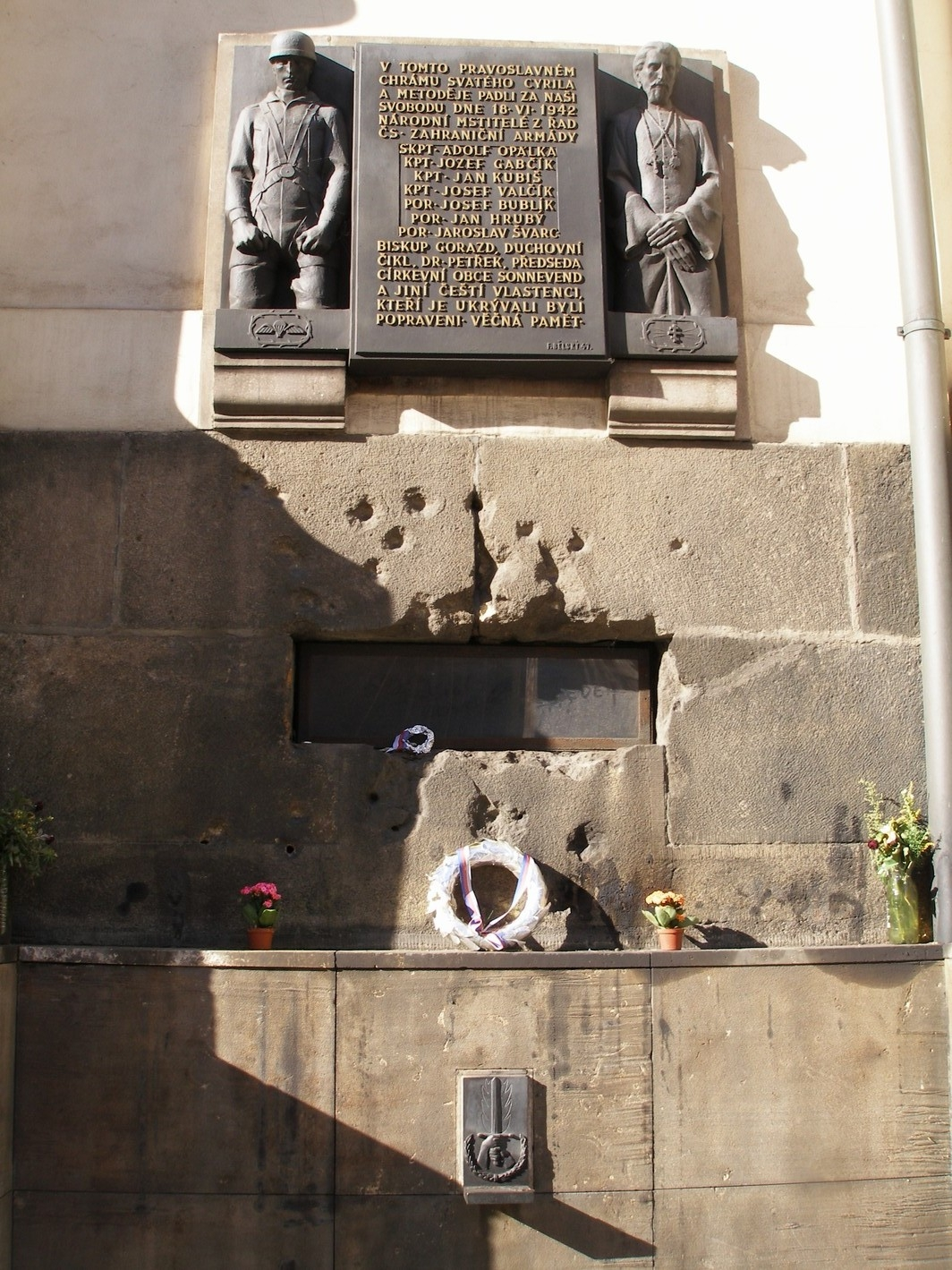 Památník parašutistů a duchovních